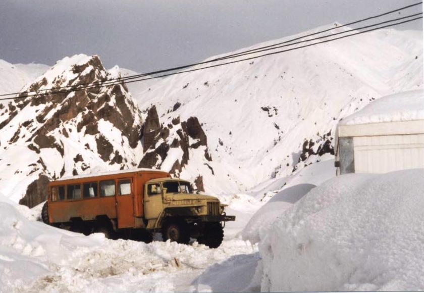 Ural-375D-based bus in Tajikistan.